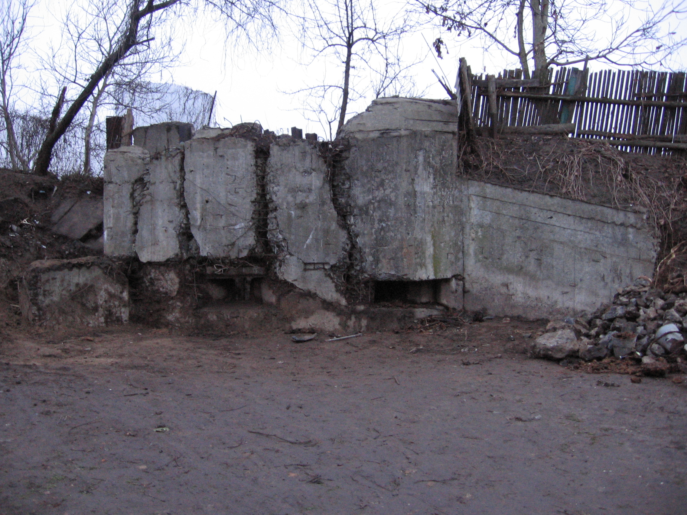 Фото двухэтажного ДОТа №385 Киевского укрепрайона.